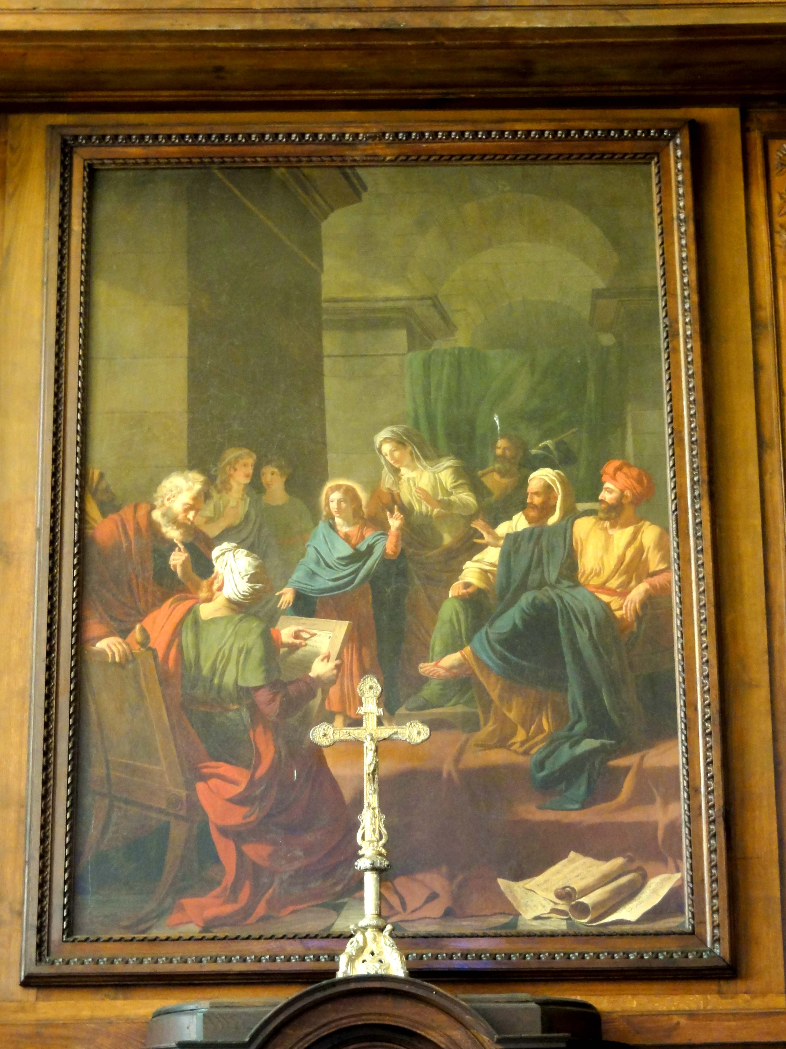 Collatéral nord, tableau de retable, Jésus parmi les docteurs de la Loi de 1789, par Charles Thévenin (1764-1838).